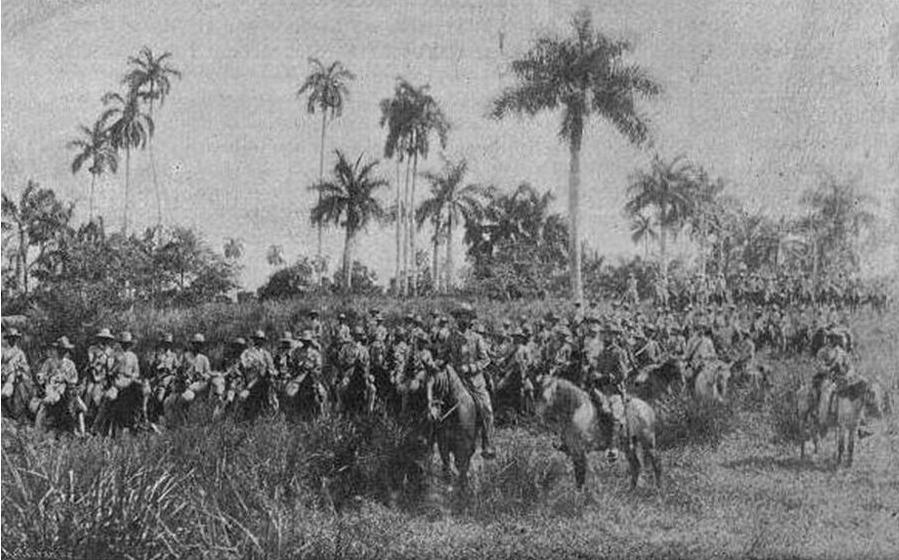 Tropas del Castilla n.16 en Cuba